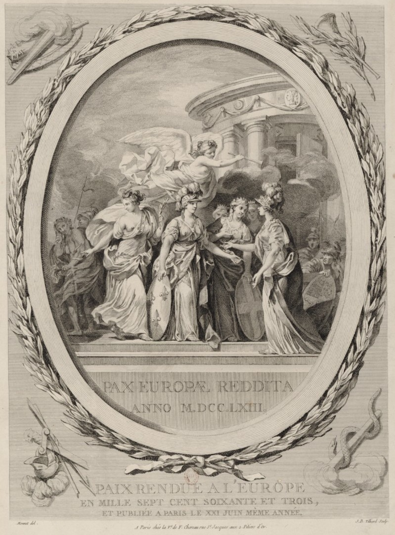 Estampe allégorique représentant le traité de Paris en 1763. Au centre : les principaux pays sous la forme de déesses antiques. Texte : Paix rendue à l'Europe en mille sept cent soixante et trois et publiée à Paris le XXI juin même année.